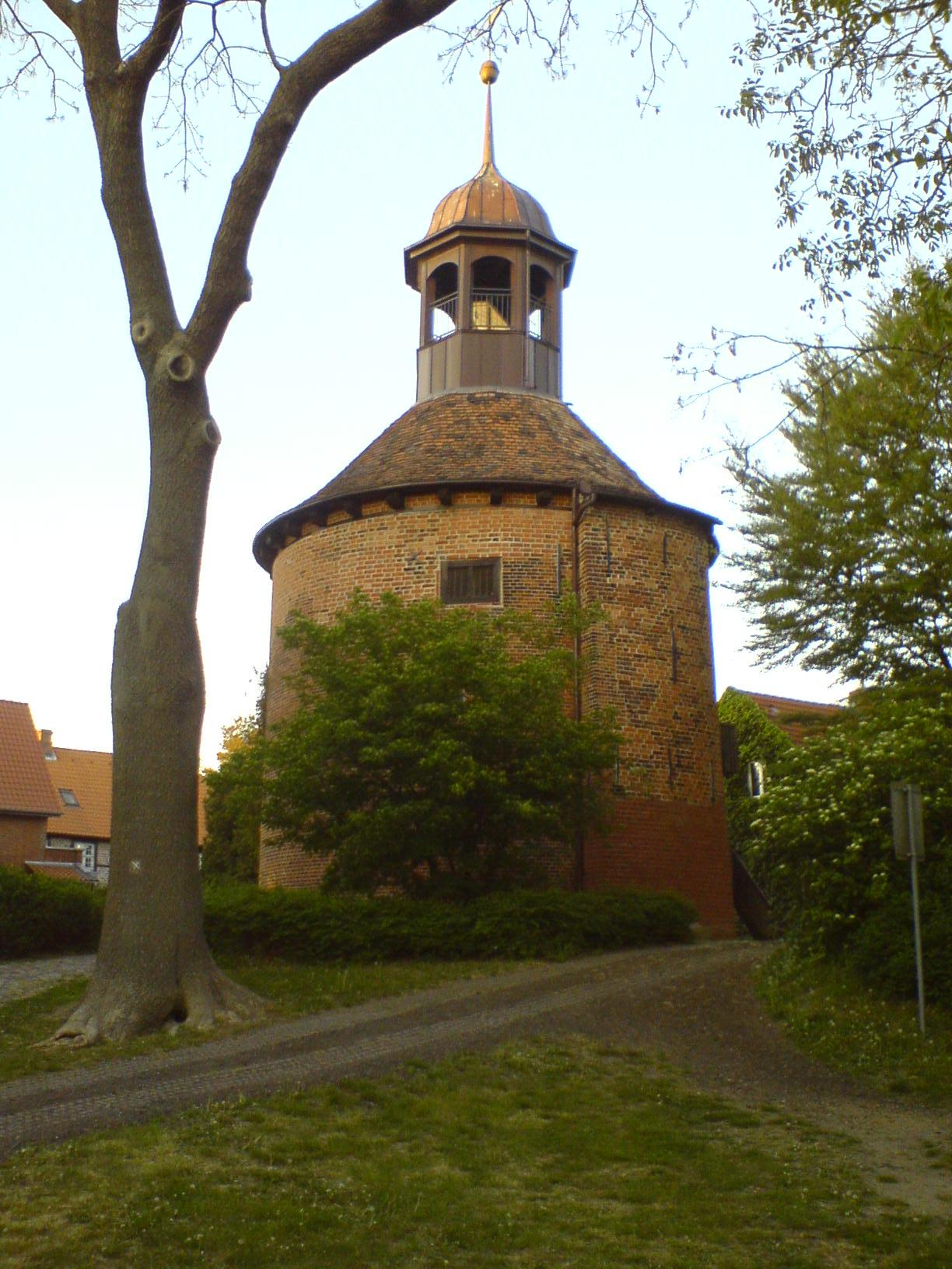 Schlossturm des Lauenburger Schlosses.